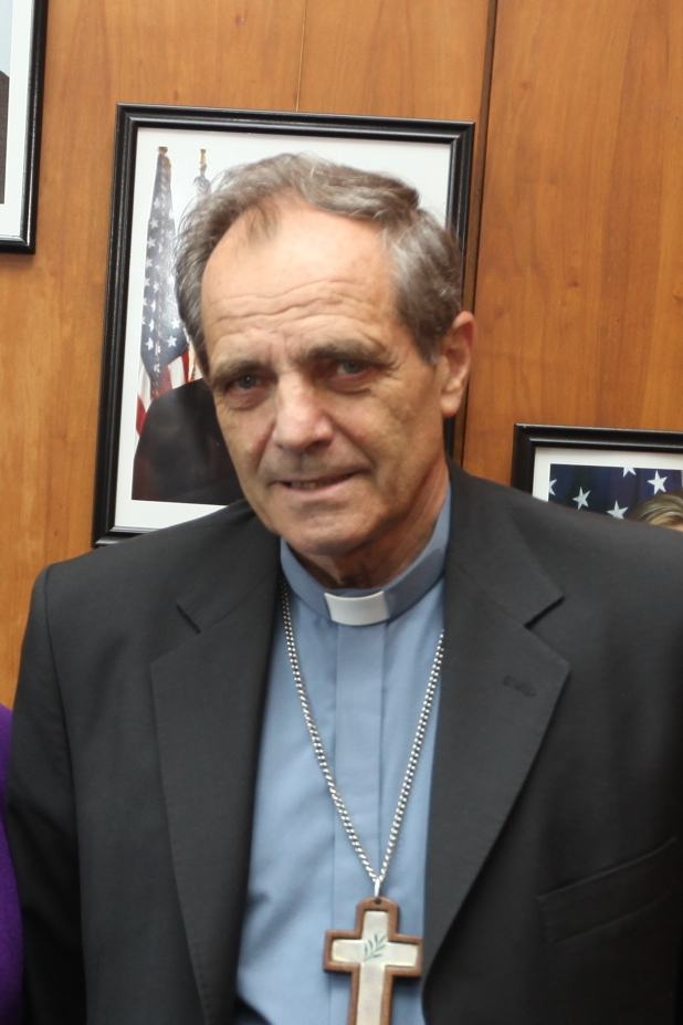 El Presidente de la Comisión de Pastoral Social de la Iglesia Católica en Argentina, Monseñor Jorge Casaretto